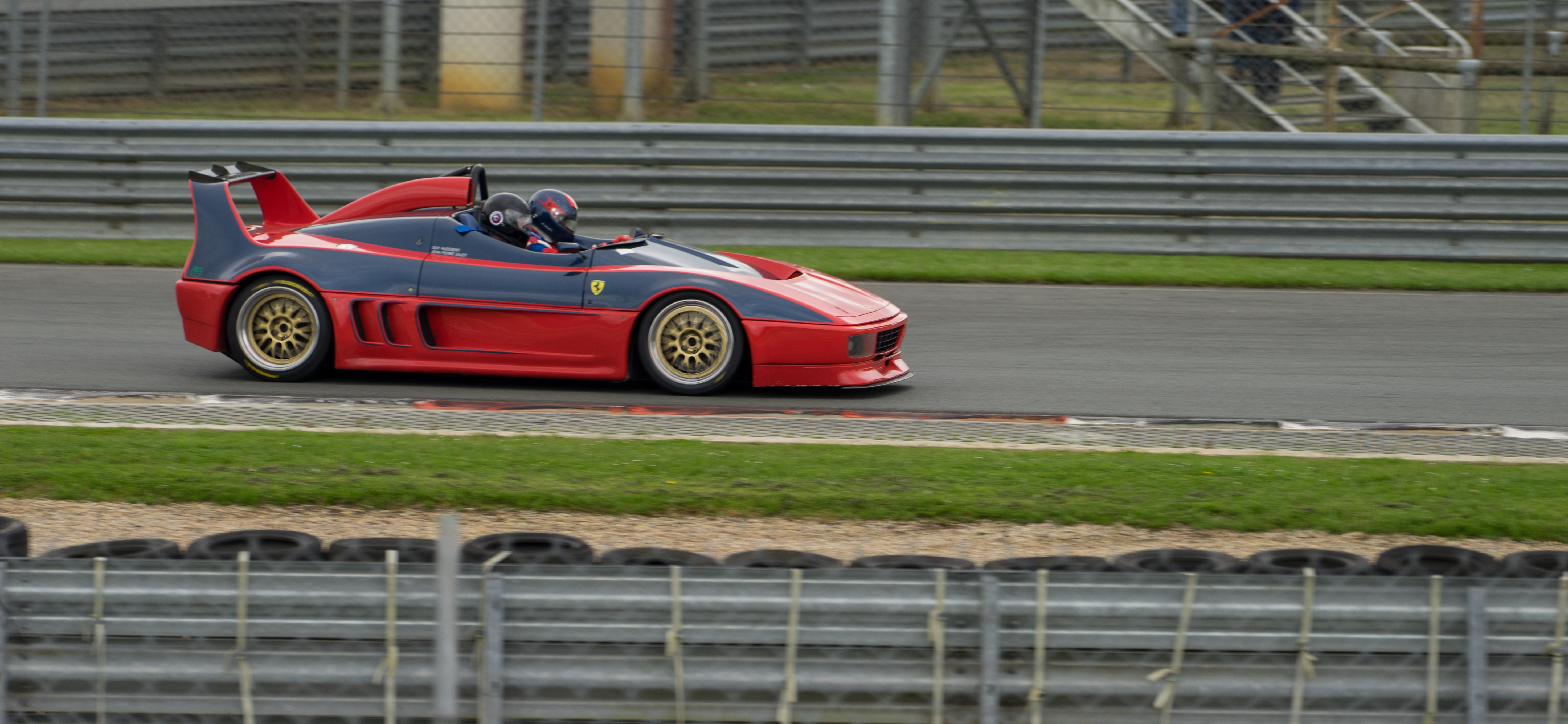 V8 350cv 1100kg